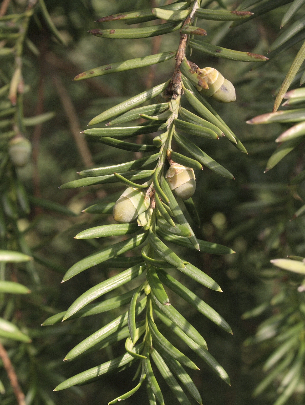 Taxus baccata, Arilos tempranos. Parque del Oeste, Madrid.